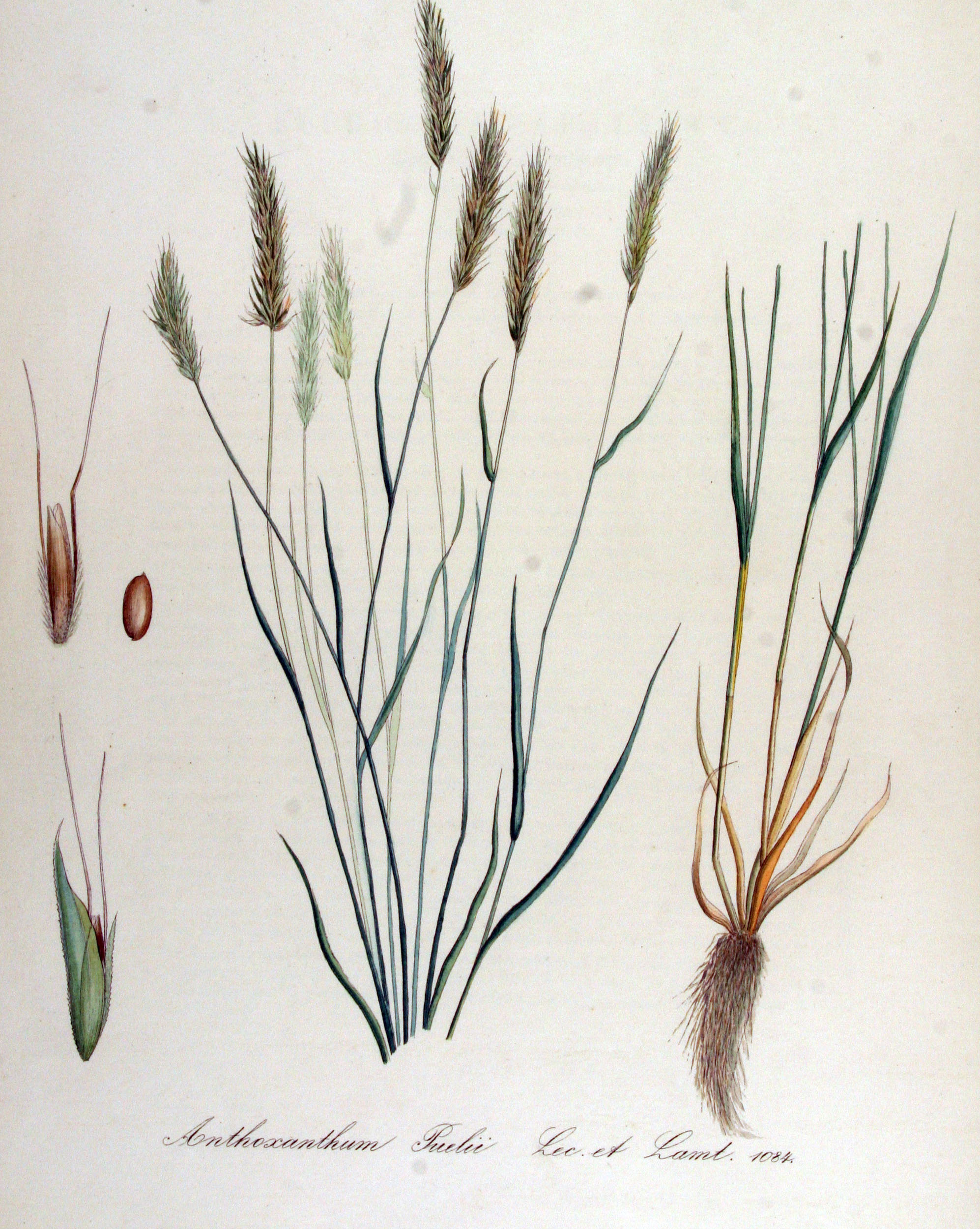 Anthoxanthum puelii